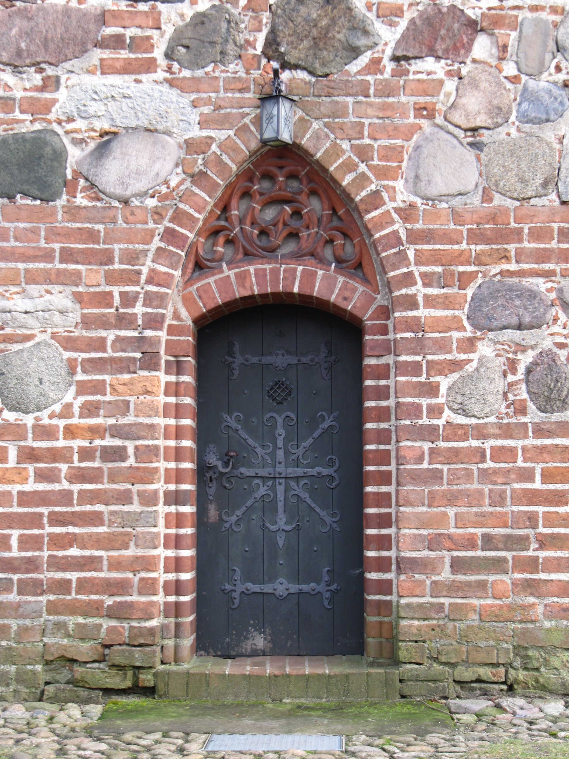 kirche ketzür westportal